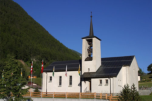 Kirche von Oberems (Turtmanntal)